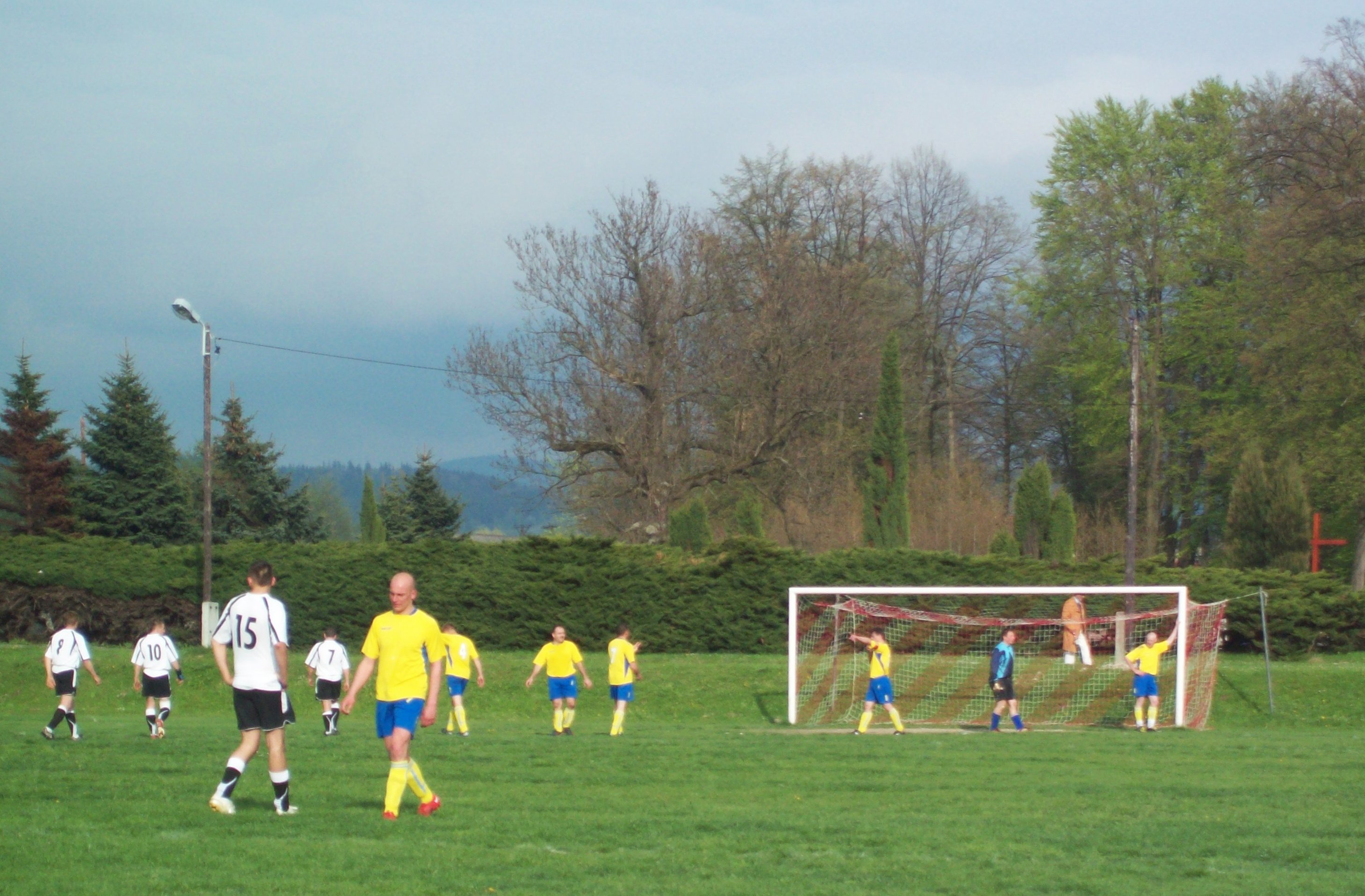 LZS "Zamek" Trzebieszowice